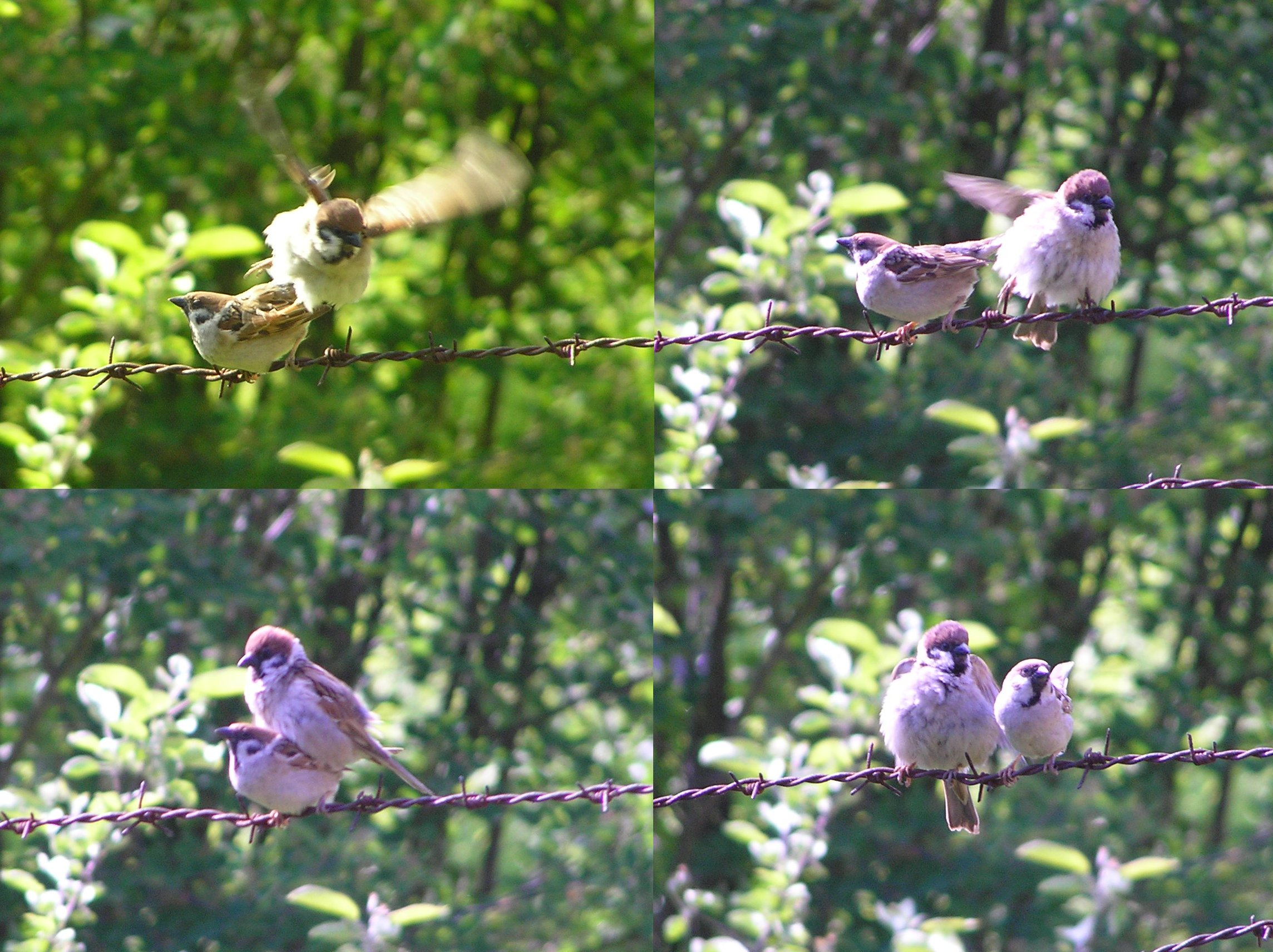 Passer montanus, Wróbel domowy w okresie godów, Białowieża, Poland